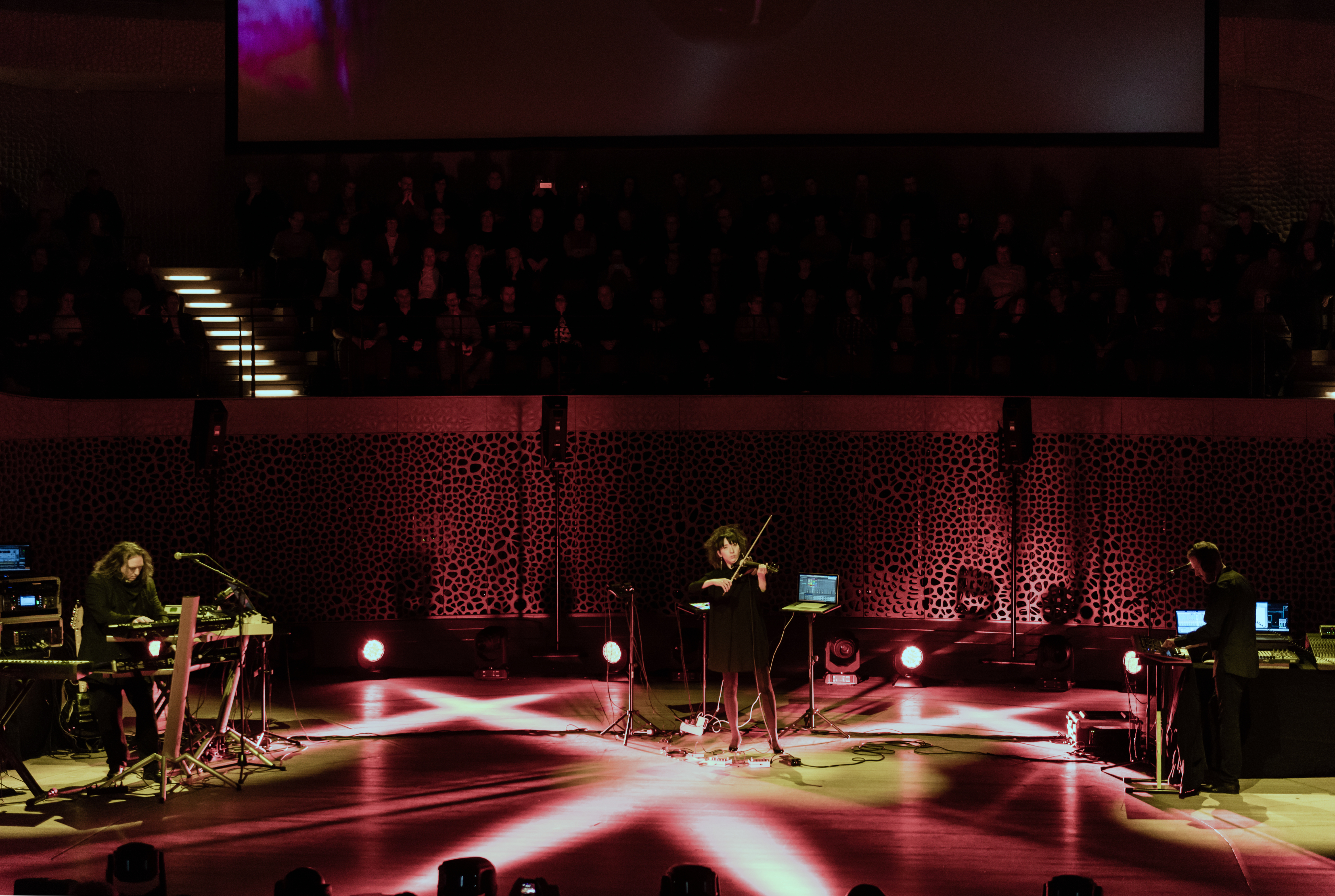 Tangerine Dream bei der Quantum of Electronic Evolution Tour in der Elbphihamonie Hamburg 2018